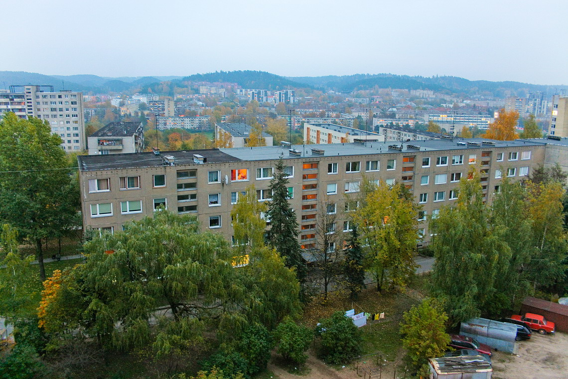 Žirmūnai evening